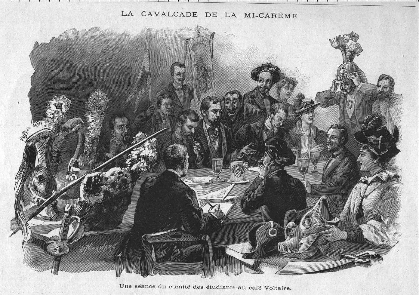 La commission en plein travail : on aperçoit MM. Bril, Lecat, Emile Merwart, Ovize, Nadaud, des "bachelettes", etc. Deux des présents portent la faluche.